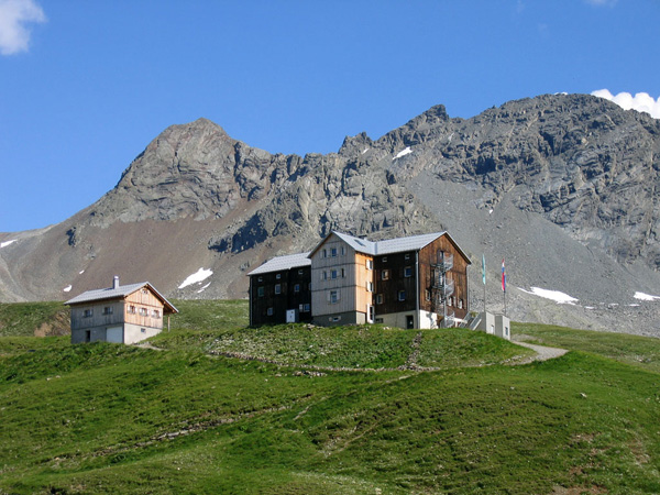 Neue Heilbronner Hütte mit Winterhaus. Im Hintergrund Schaftäler (Schaftälispitz), Schrottenturm, Schrottenkegel und Schrottenkopf - alle Gipfel liegen in der Fluhgruppe des Verwall)